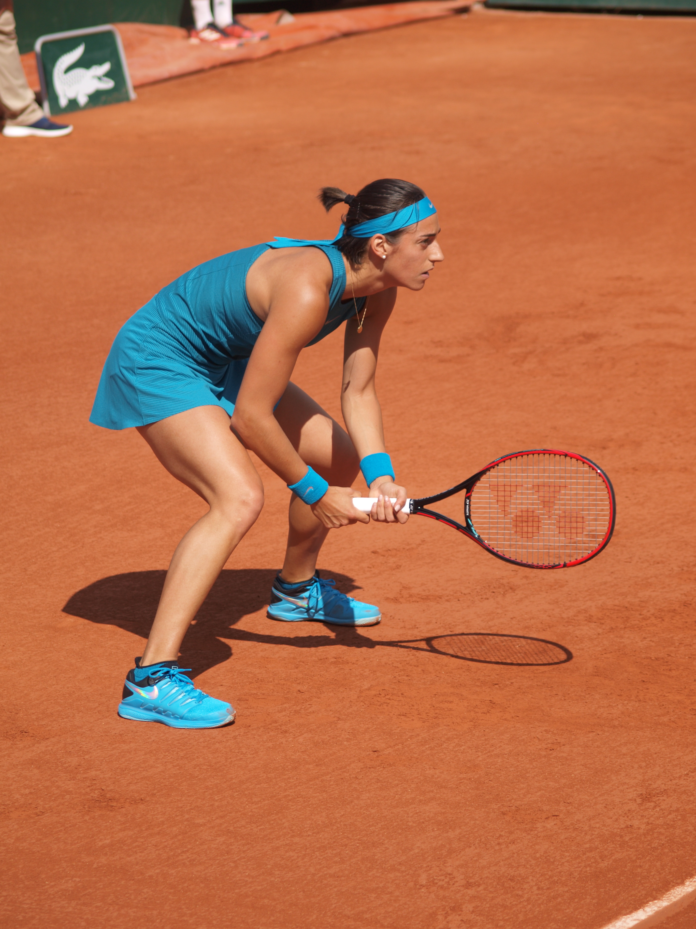 Caroline Garcia, durant le match du 29 mai 2018, sur le court Lenglen (stade Roland Garros) en compétition contre Yingying Duan.